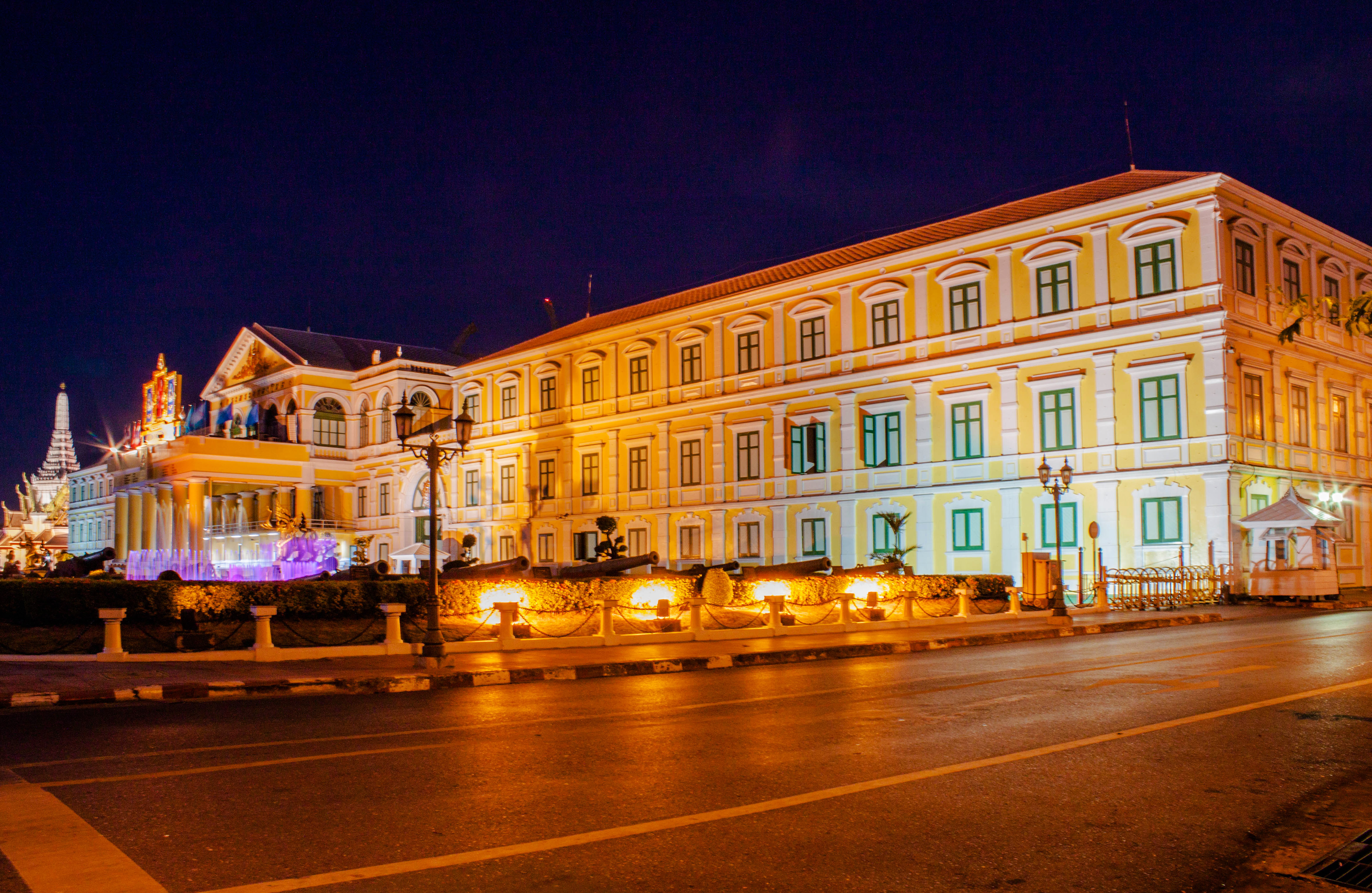 อาคารกระทรวงกลาโหม ถนนราชดำเนินใน เขตพระนคร กรุงเทพมหานคร